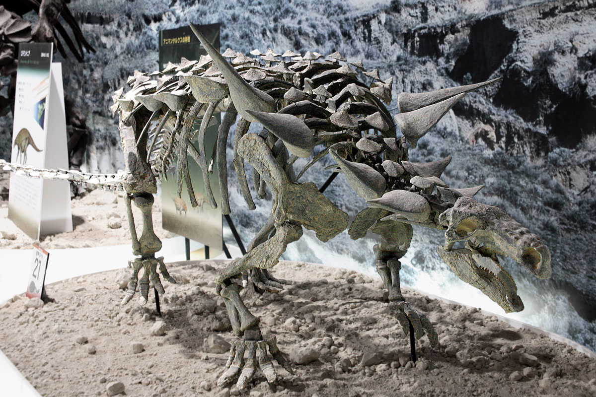 Animantarx - 01